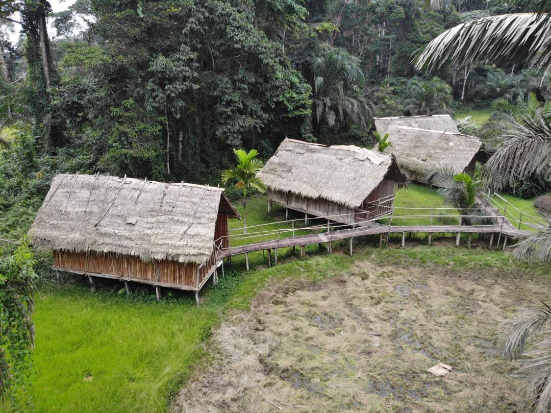 Cabane aménagées, foret Oveng, Sud Cameroun